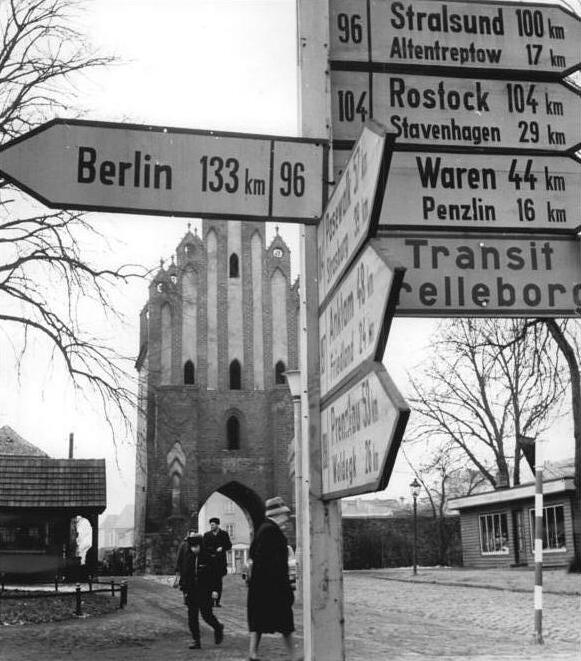 Neubrandenburg, Friedländer Tor Zentralbild Sturm Lb-At.Neubrandenburg: Das neue Leben zog in eine alte Stadt. Neubrandenburg, durch den Krieg stark zerstört, ist heute ein neue moderne Stadt. In den letzten vier Jahren wurden 3500 neue Wohnungen gebaut. Um 10.000 Menschen wuchs die Einwohnerzahl nach den Zerstörungen im 2. Weltkrieg bis auf 35 000. Der Staat der Arbeiter und Bauern investierte seit Baubeginn 50 Millionen DM in diese Stadt. Zahlreiche Hausgemeinschaften halfen beim Bau von Kinderplätzen und bei der Verschönerung der Strasse. UBz: Neubrandenburg im Zentrum des gleichnamigen Bezirkes liegt besonders verkehrsgünstig. Im Hintergrund das "Friedlänger Tor", ein Bauwerk aus dem 12. Jahrhundert. Information added by Wikimedia users.